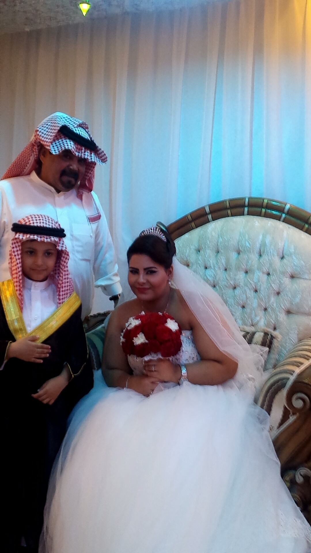 عروس في السعودية